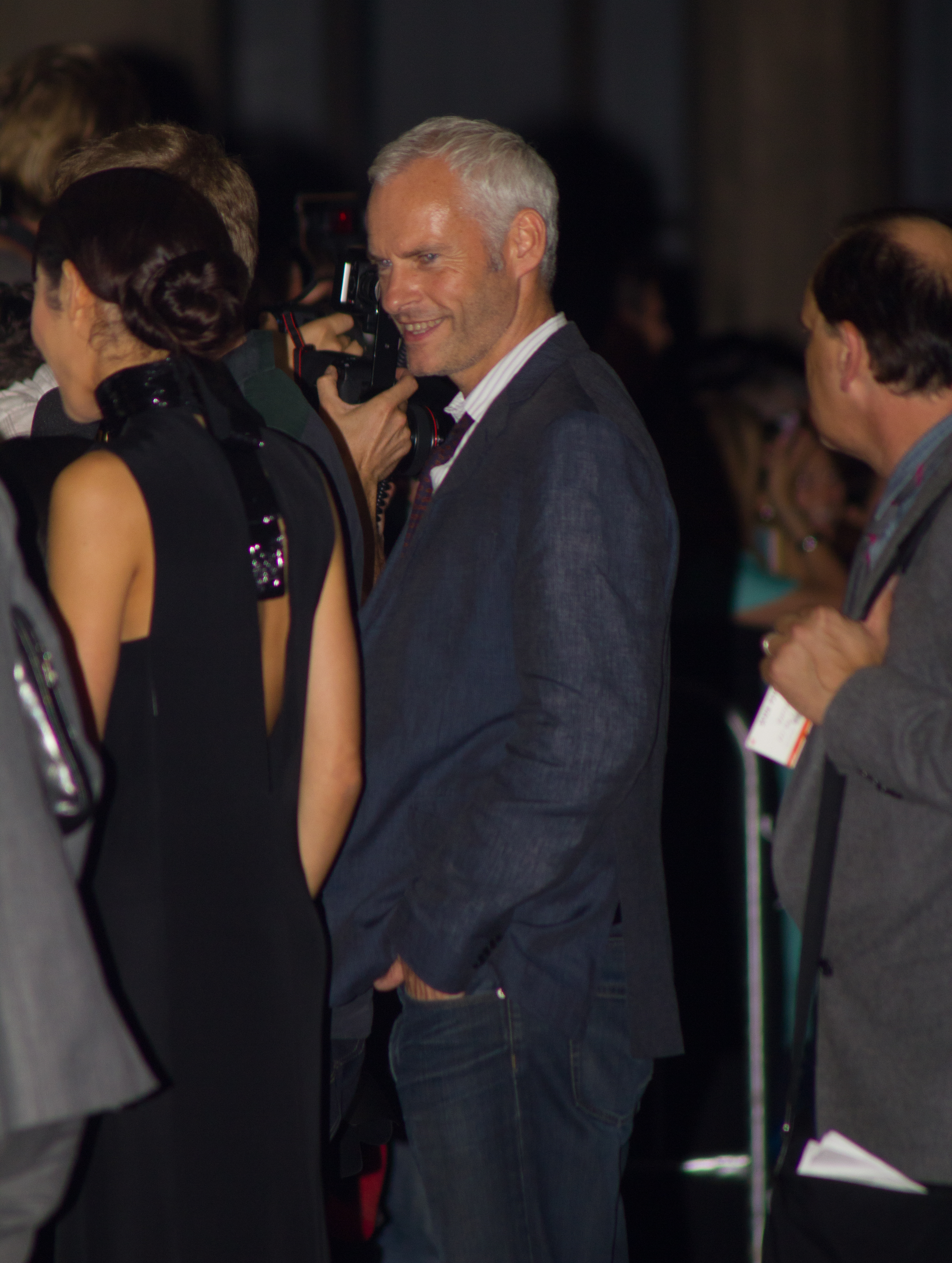 IMG-56173.jpg